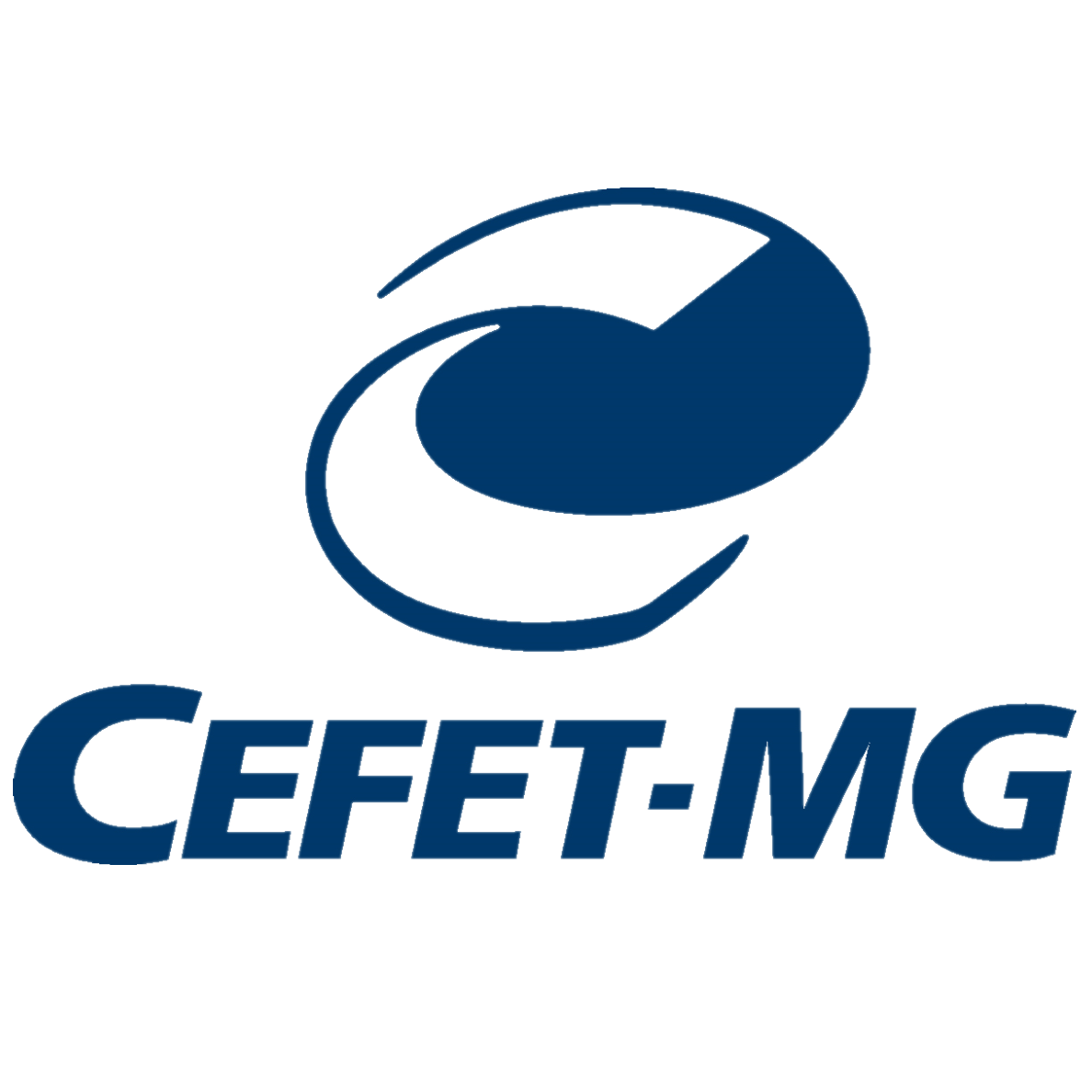 Logotipo do Centro Federal de Educação Tecnológica de Minas Gerais.